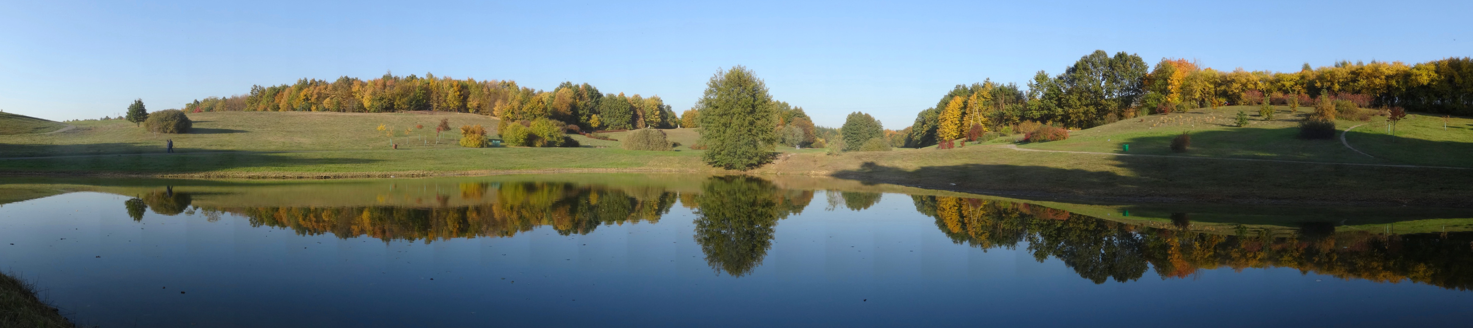 Ogród Botaniczny na terenie Leśnego Parku Kultury i Wypoczynku „Myślęcinek” w Bydgoszczy